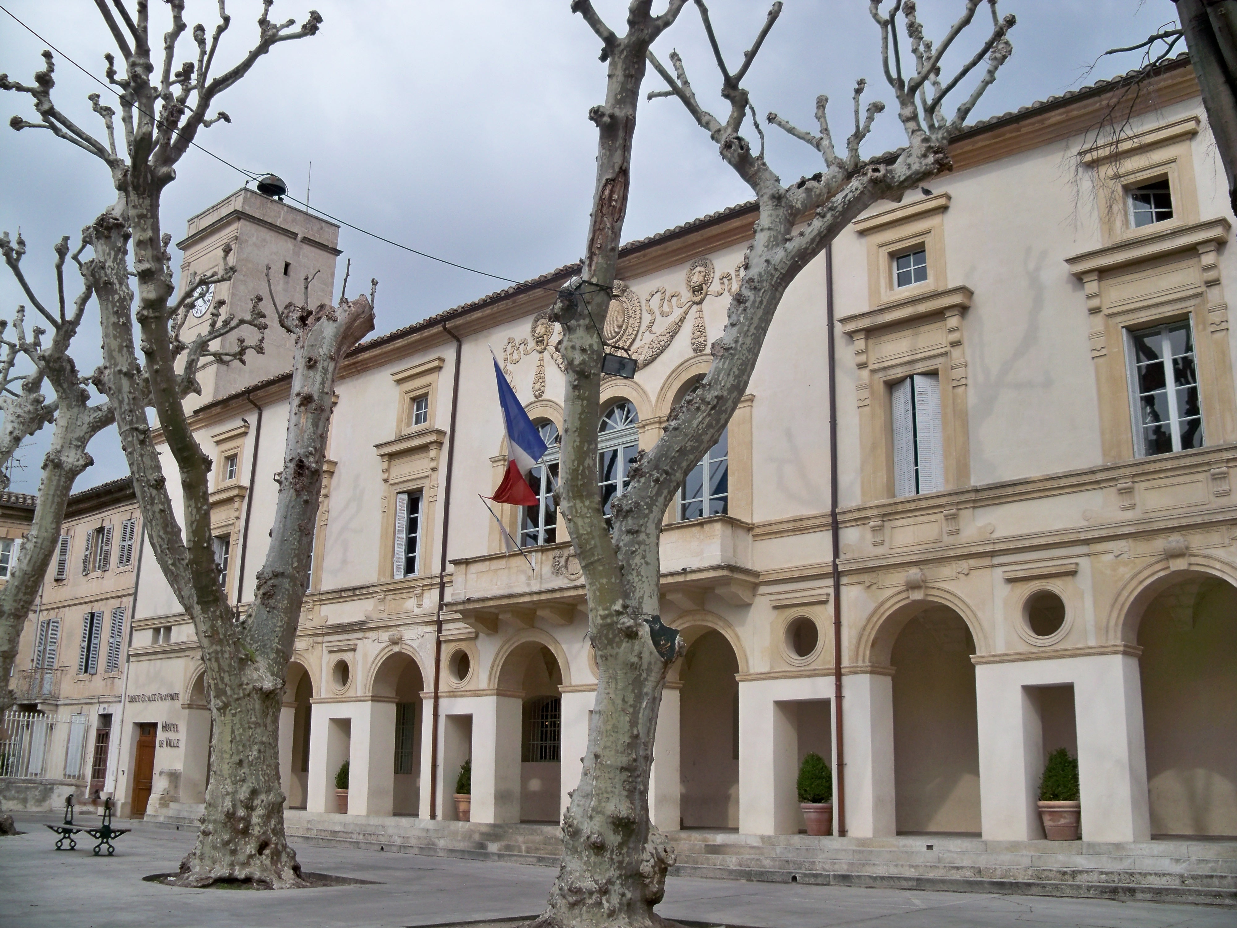 Mairie de Saint Rémy de Provence, Bouches du Rhone, France